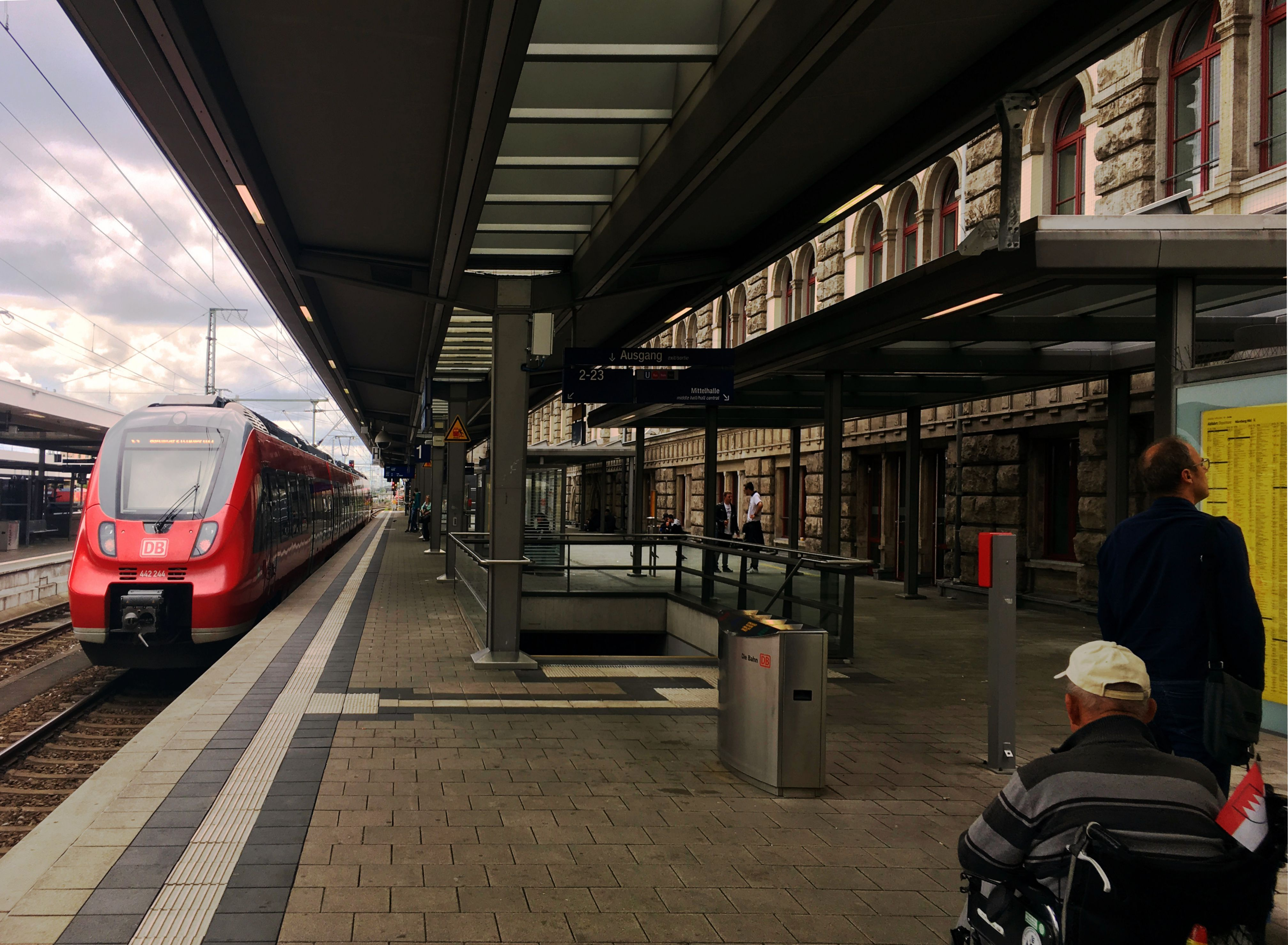 Hausbahnsteig 1 des Nürnberger Hauptbahnhofs mit S-Bahn.